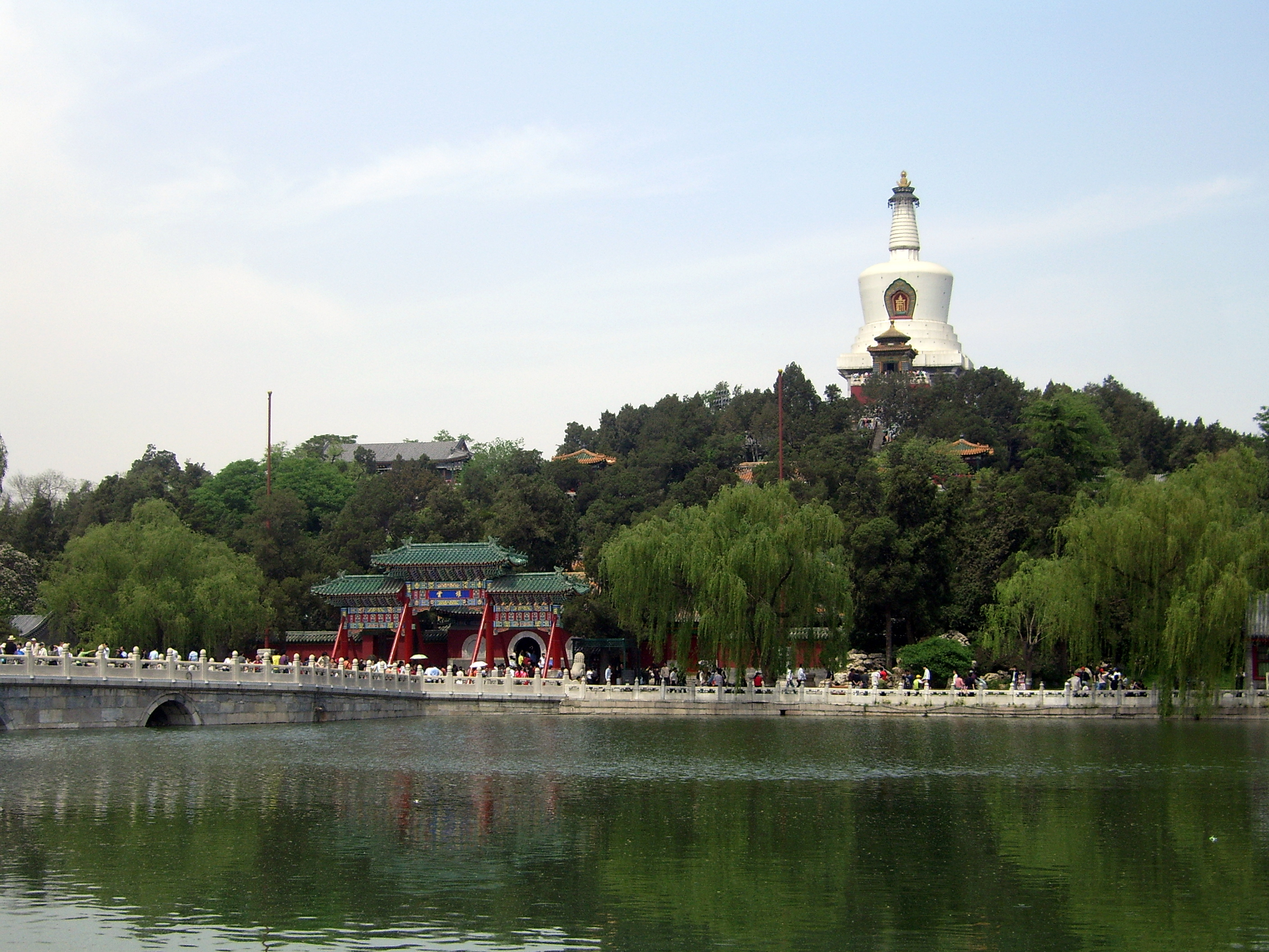 北海公园琼华岛